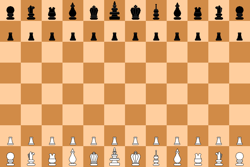 Diagrama del Ajedrez del Mensajero (Courier Chess), basado en la pintura de Lucas van Leyden y en la forma de las piezas aquí.